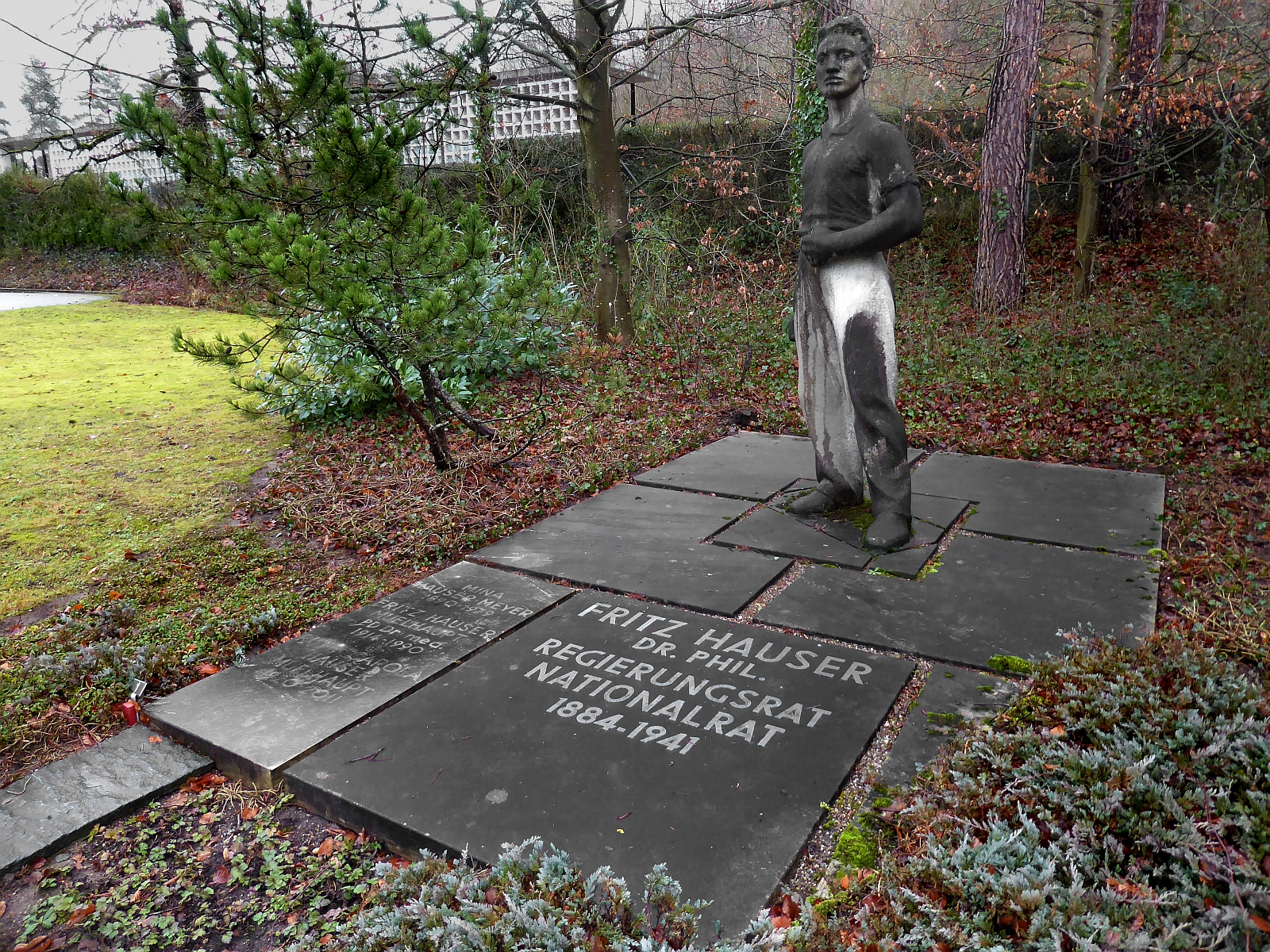 Fritz Hauser-Meyer (1884–1941) Dr. phil., Politiker, Vorsteher des Basler Erziehungsdepartement, Familiengrab auf dem Friedhof Hörnli, Riehen, Basel-Stadt